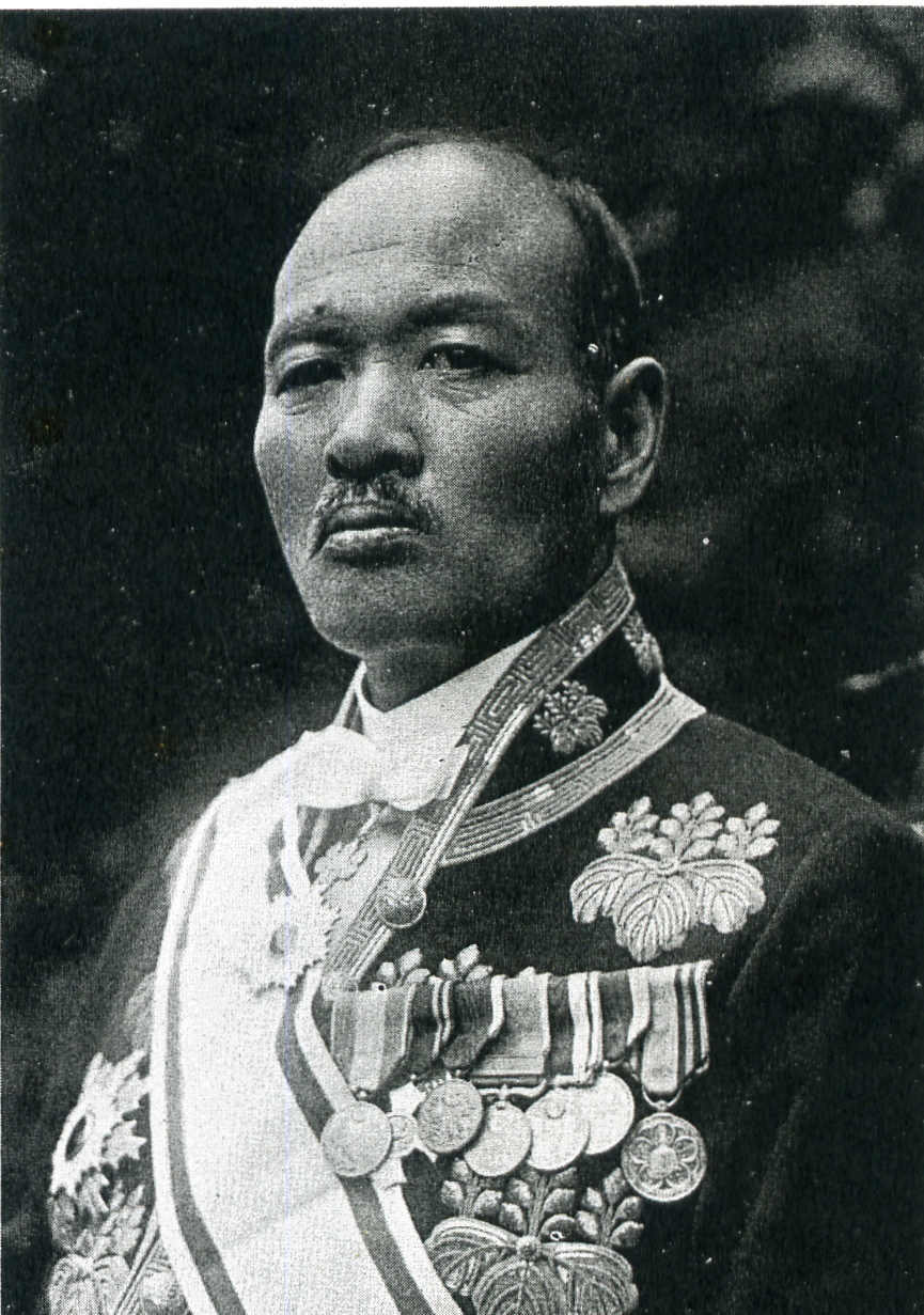 この写真は、岡喜七郎（1868-1947）の写真です。